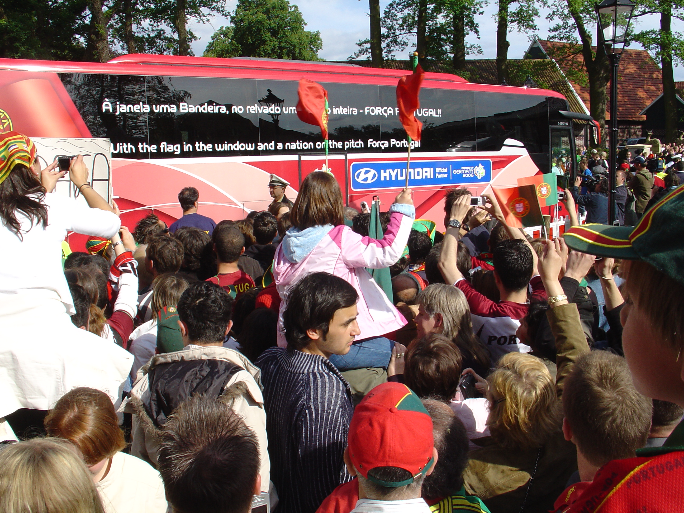 Ankunft der Portugiesischen Fußballnationalmannschaft im WM Quartier 2006, Marienfeld